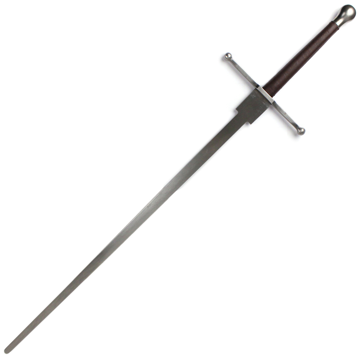 Federschwert od Outfit4Events